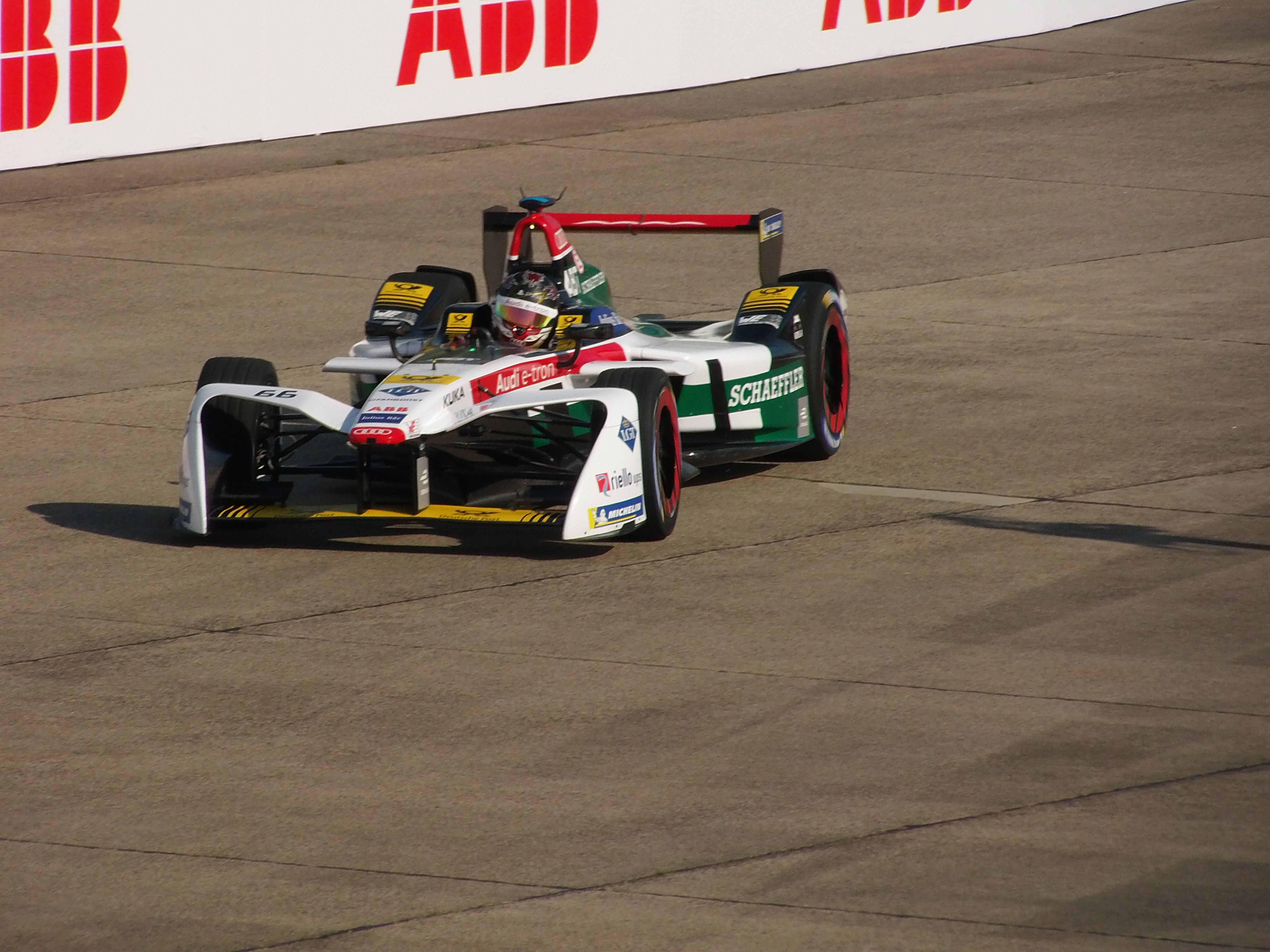 Daniel Abt im Audi e-tron FE04 beim Berlin E-Prix 2018